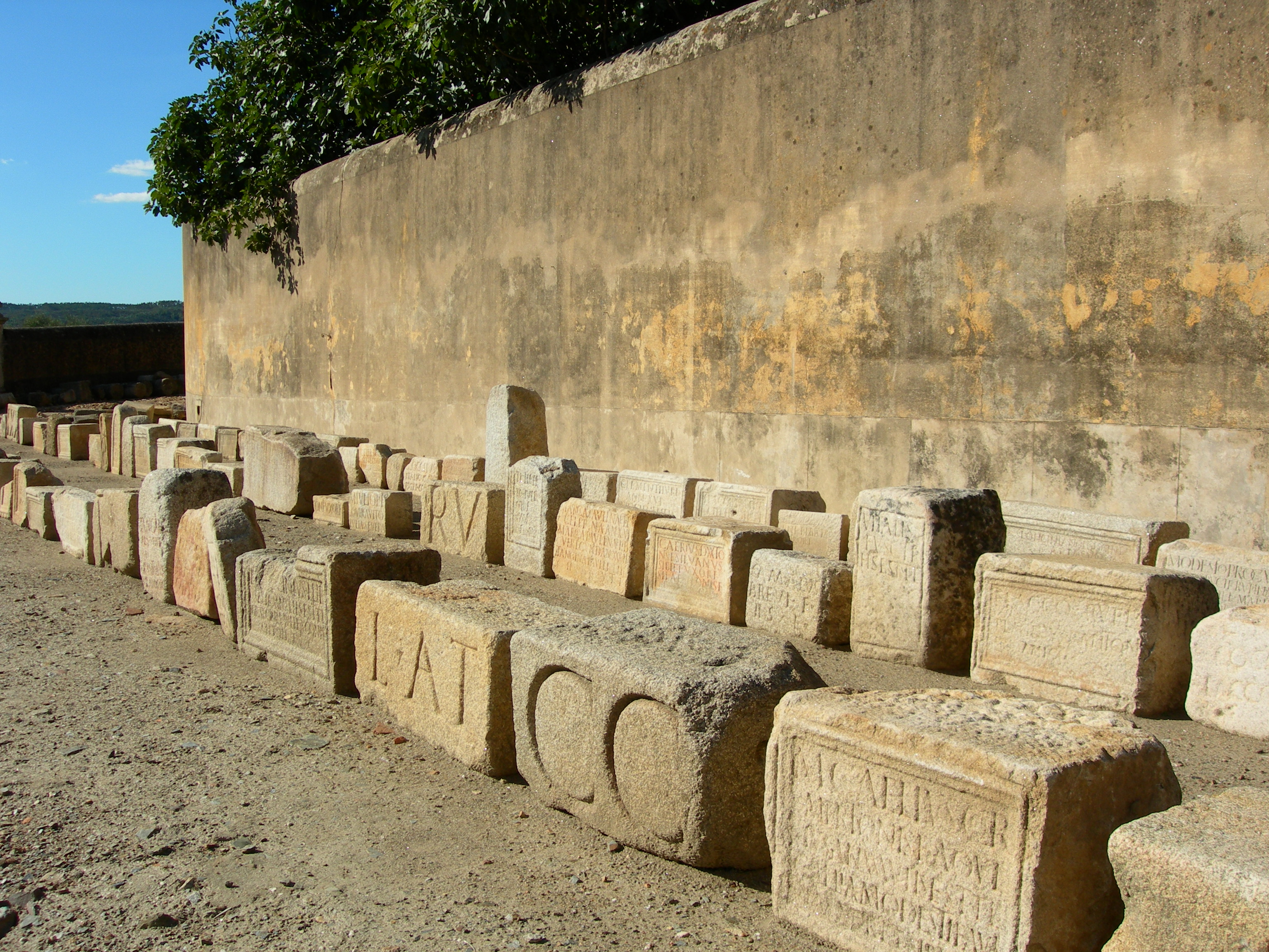 Lápidas funerarias This monument is classified as Monumento Nacional. This file was uploaded for Wiki Loves Monuments in Portugal with the unique identifier 70554.